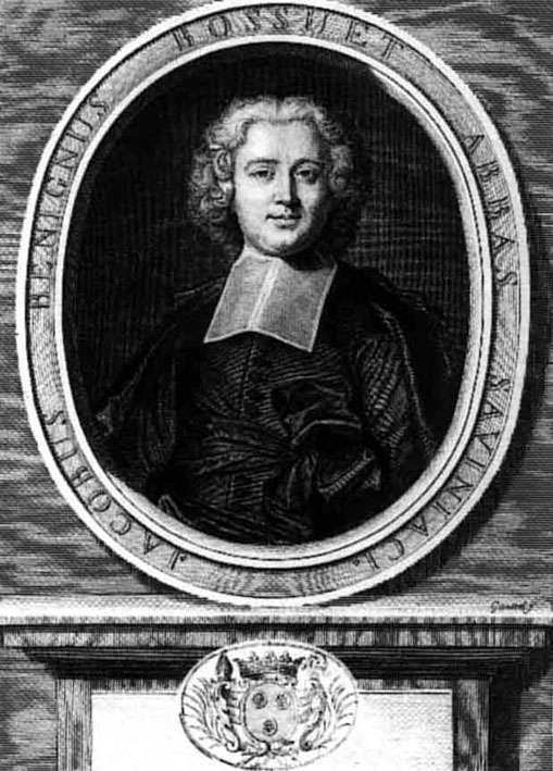 Jacques Bénigne Bossuet de Savigny